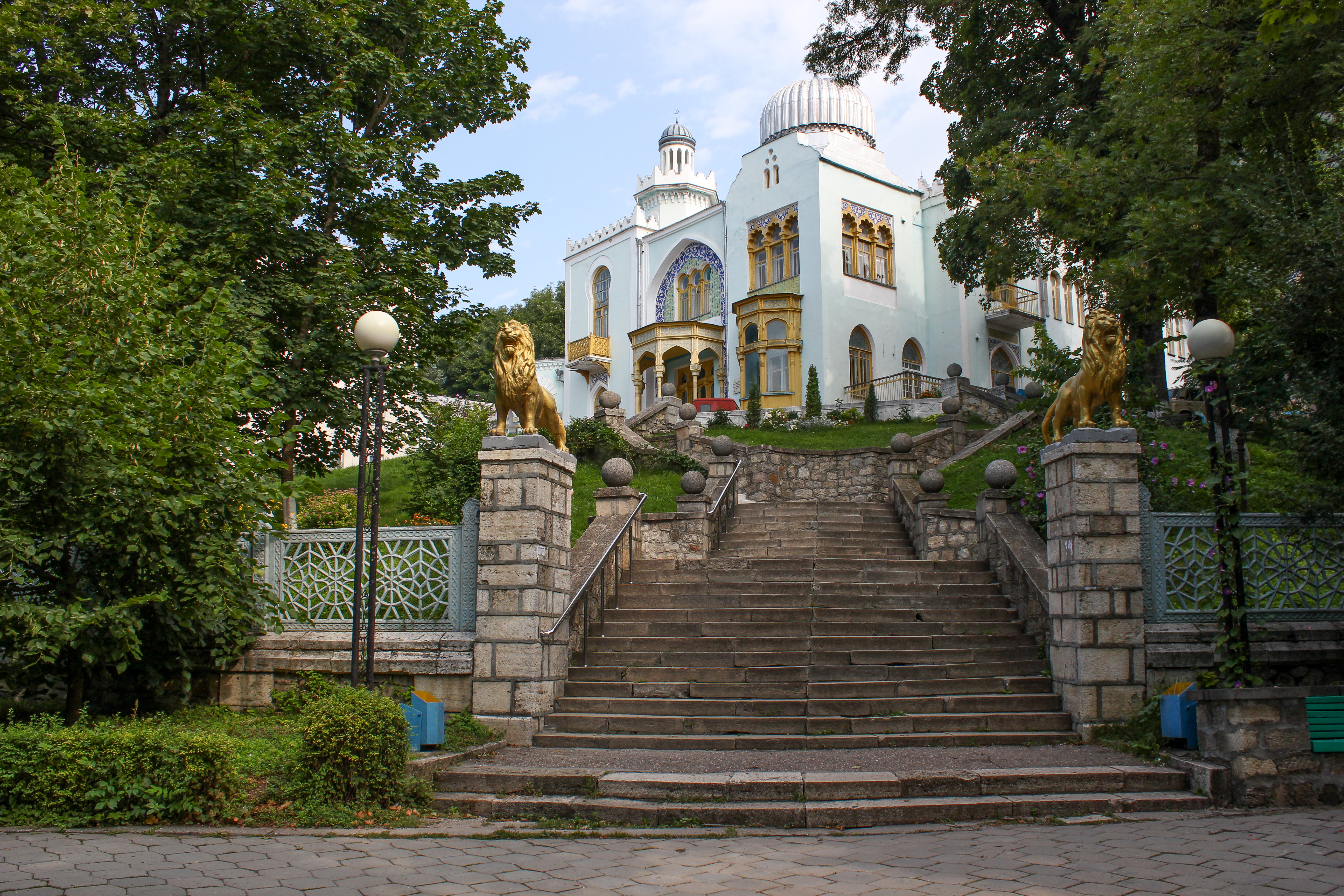 Дача эмира бухарского (Ставропольский край, Железноводск, Лермонтова улица, 2а)